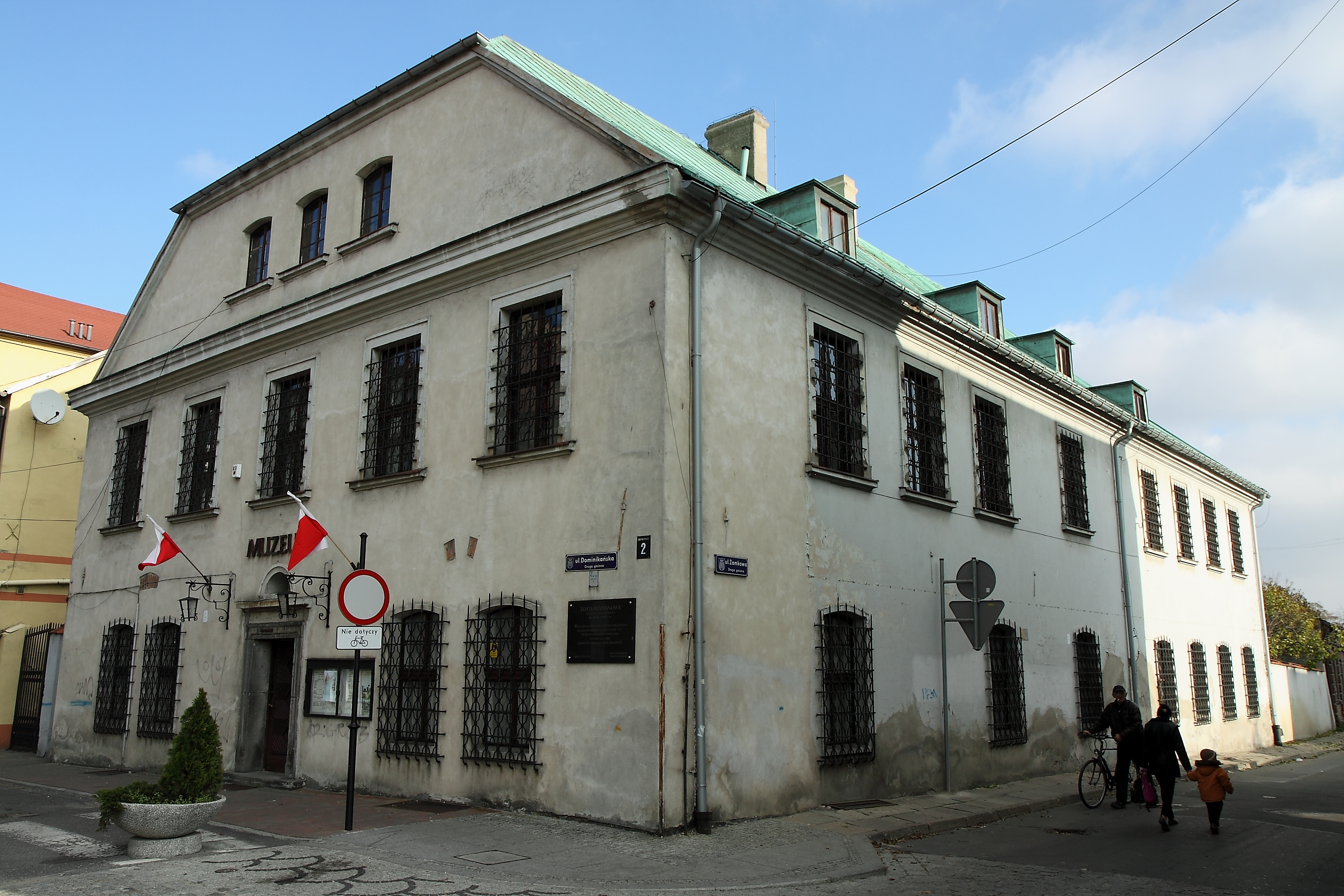 Sieradz, ul. Dominikańska 2 - kamienica, mur., XVII, XIX/XX w., obecnie Muzeum Okręgowe (zabytek nr 57/293 z 28.12.1967)